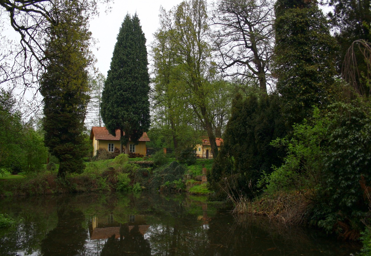 Dolní rybníček v Luftově zahradě, Plzeň, Česká republika